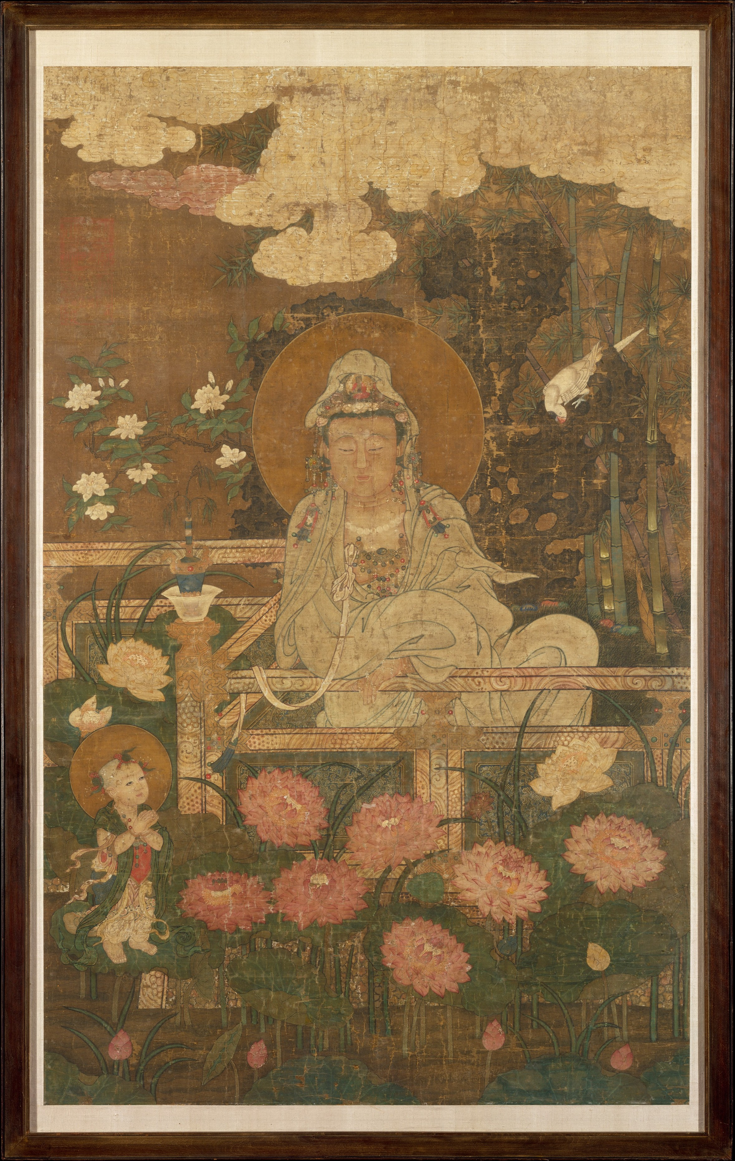 China; Hanging scroll; Paintings